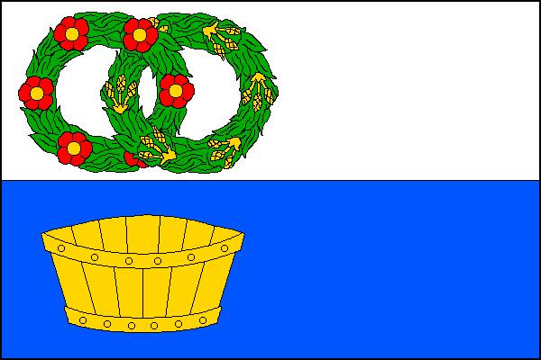 Vlajka obce Chotiněves